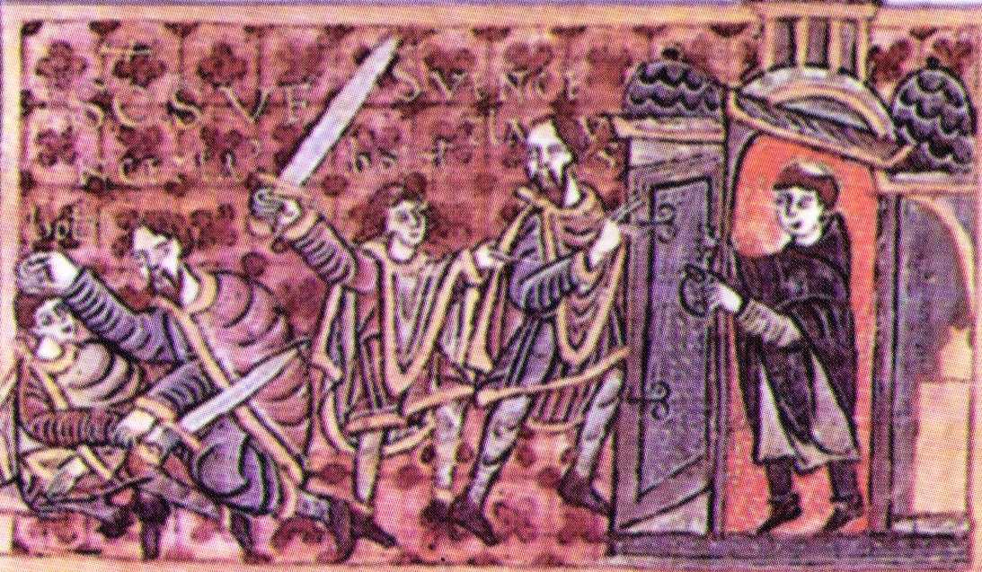 Zabójstwo Wacława